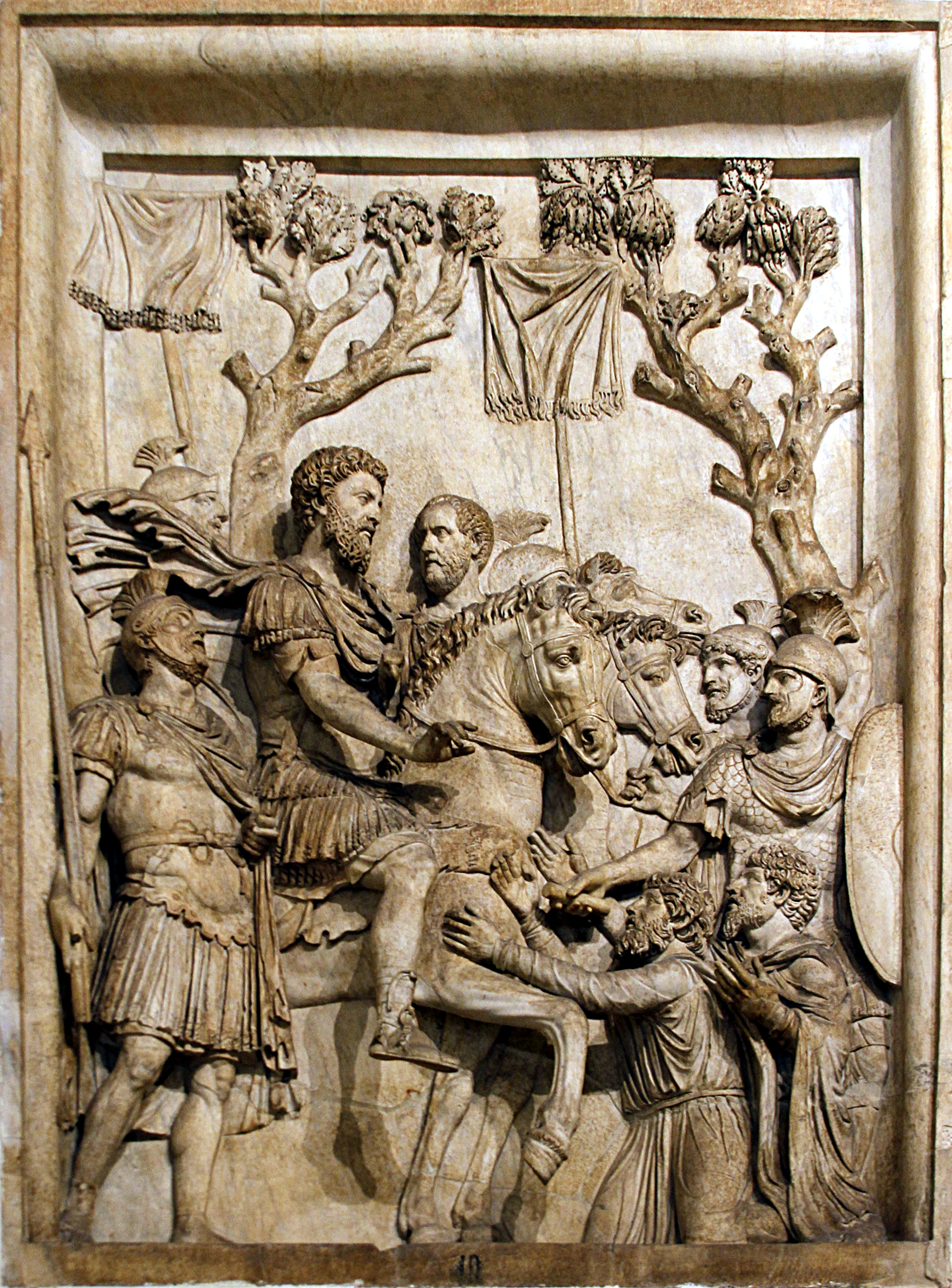 Musei Capitolini - Rome